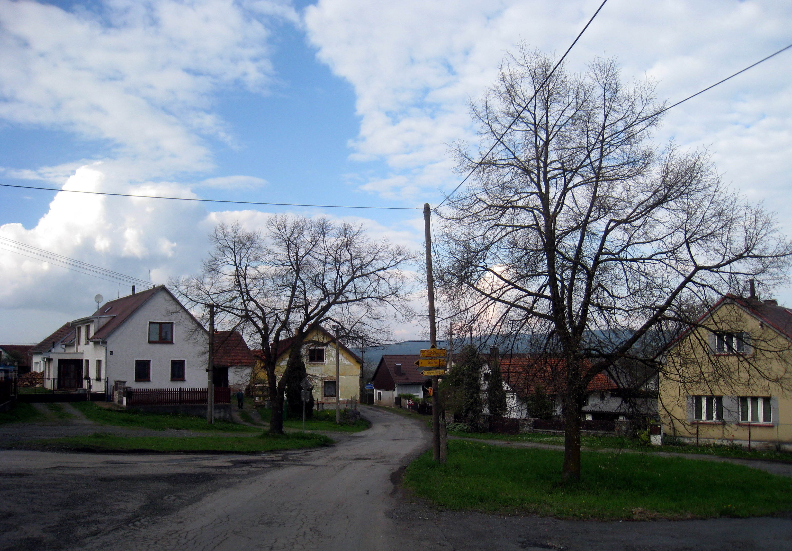 Železný Újezd (okr. Plzeň-Jih), součást obce Čížkov - pohled na náves